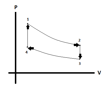 Gráfico de Stirling